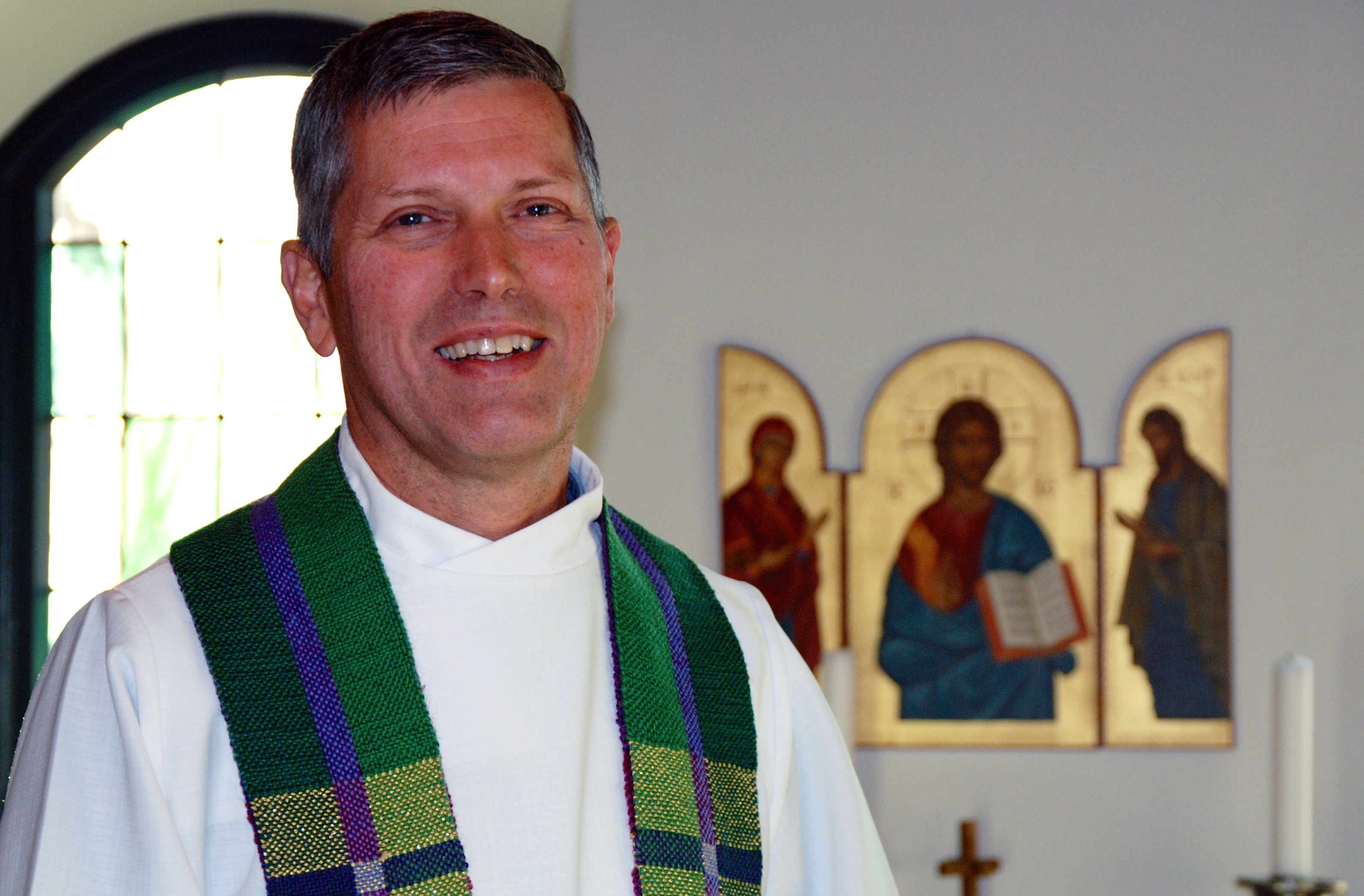 Ivar Braut, biskop emeritus i Stavanger